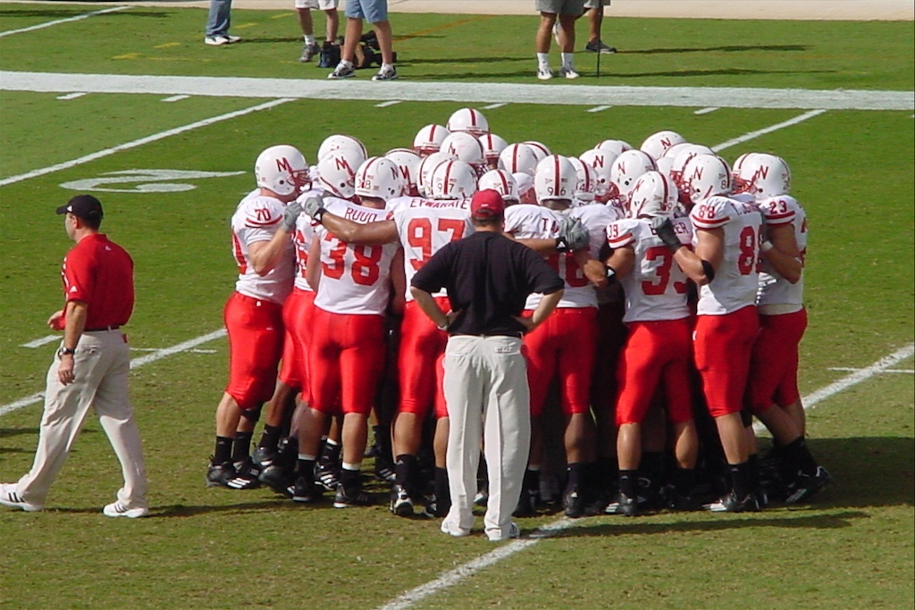 Nebraska huddling before a game versus rival Texas